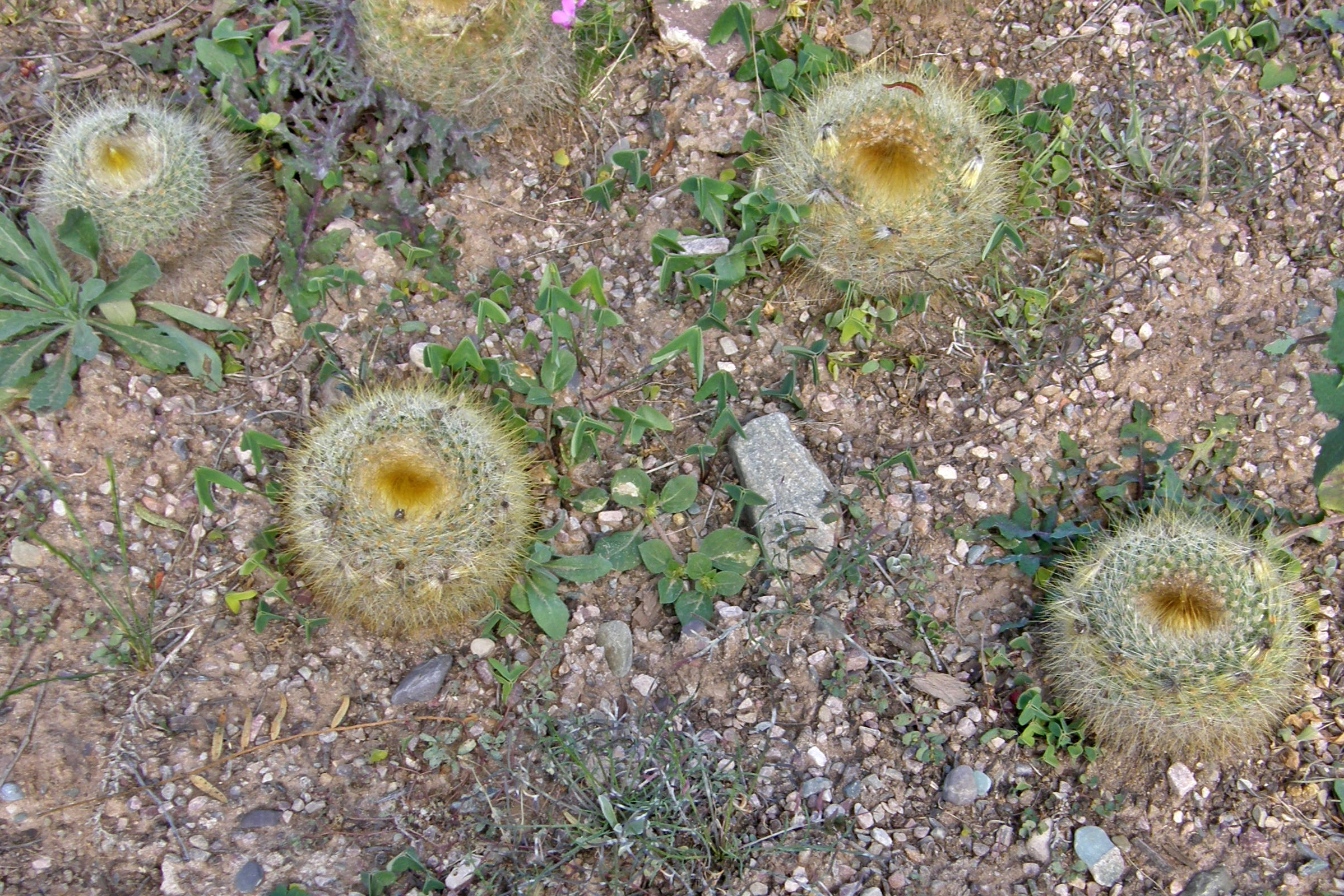 Parodia chrysacanthion, photographié dans la cactuseraie de Tilcara (Argentine)